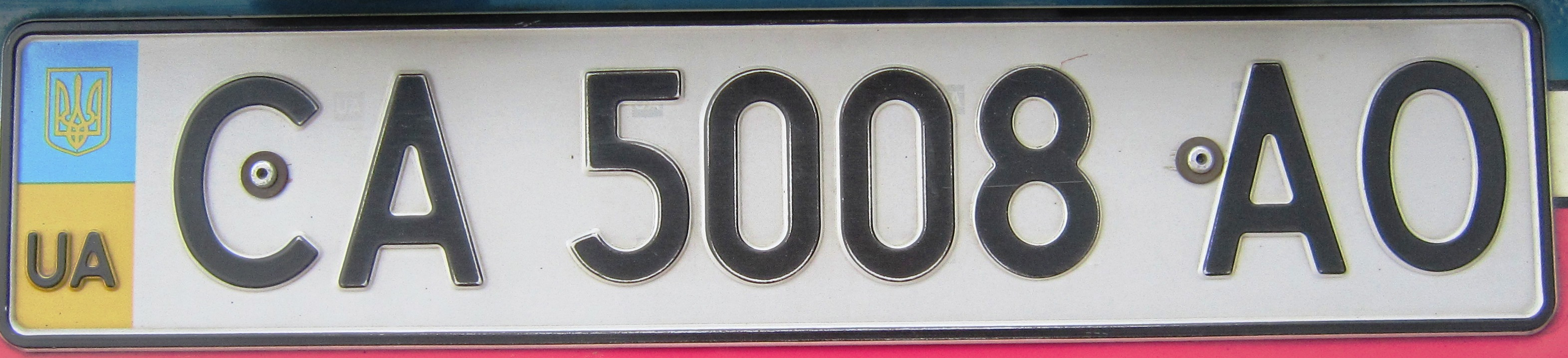 Oekraïne kenteken